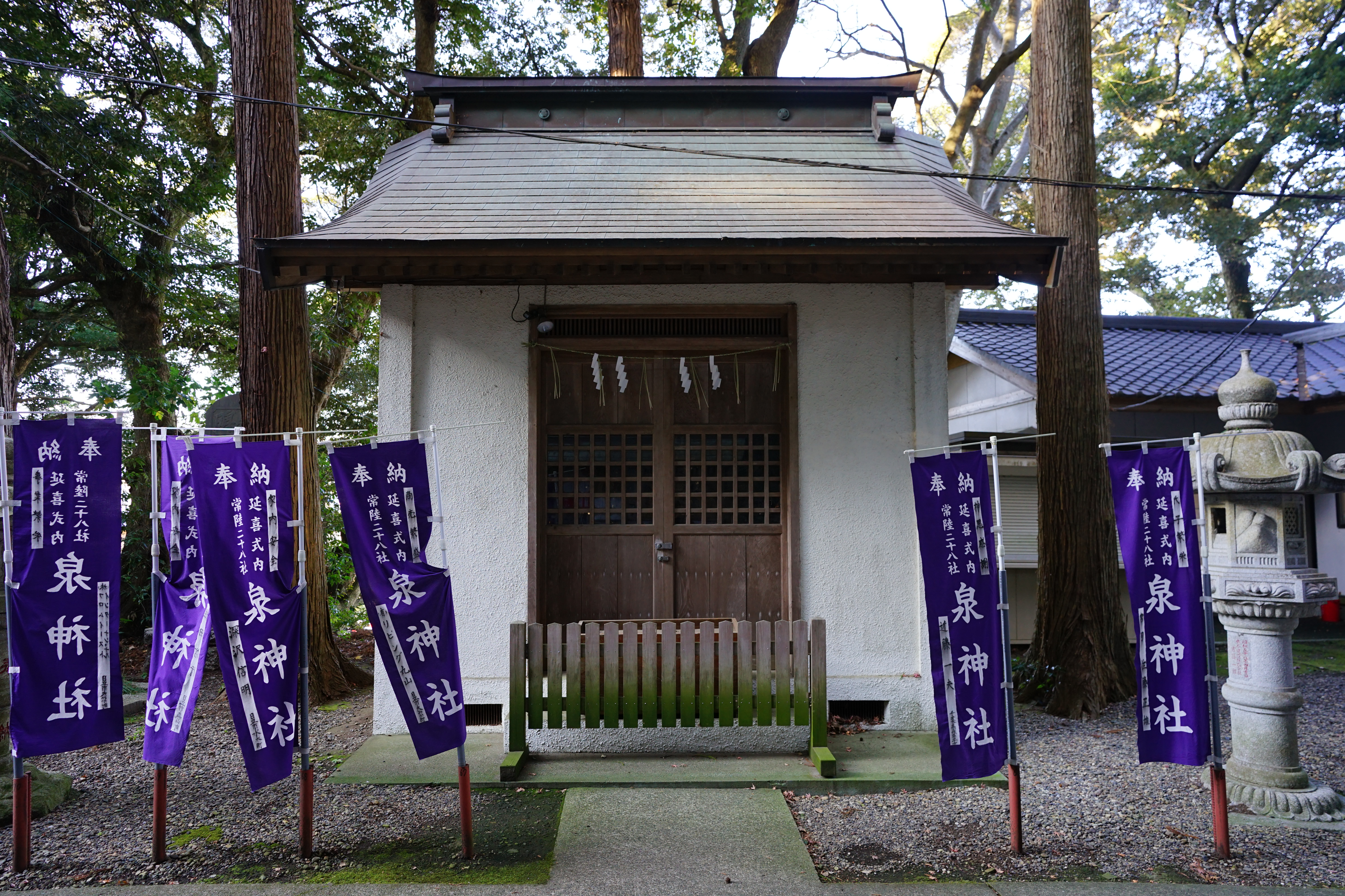 泉神社の神輿殿（茨城県日立市）